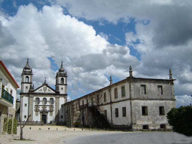 Mosteiro de Santo André de Rendufe, Portugal.